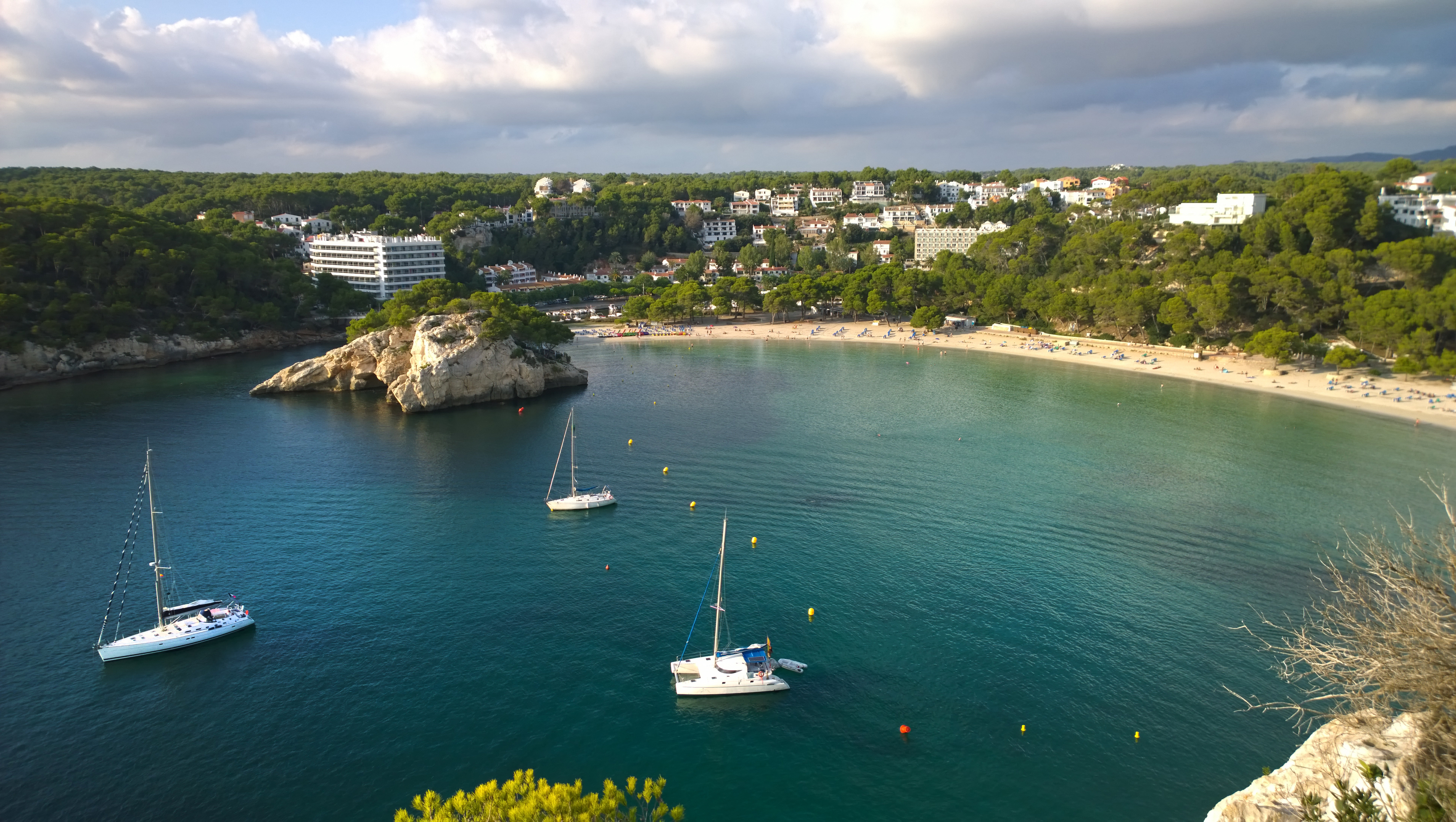 Cala Galdana